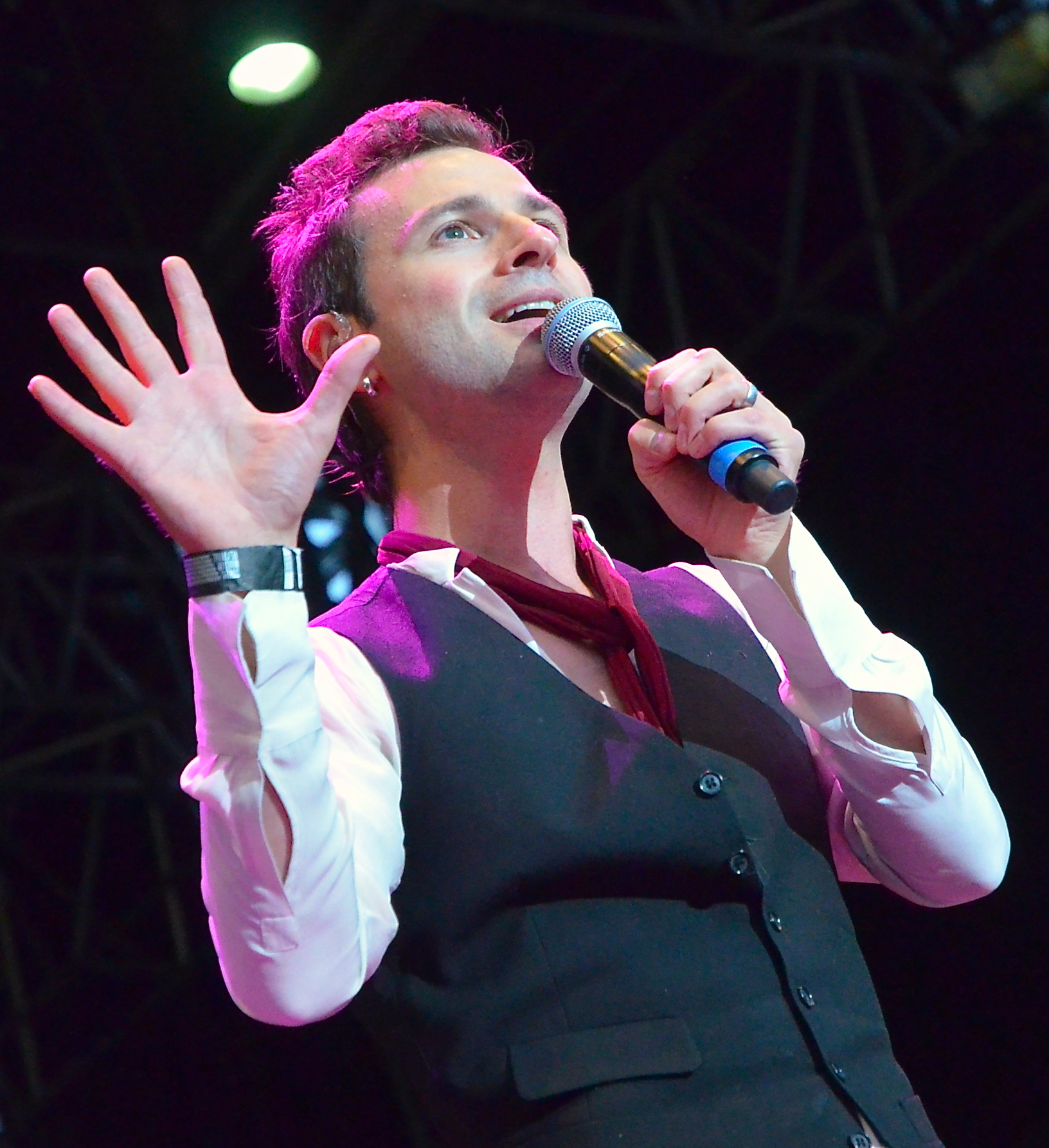 Ola Salo på Stockholms kulturfestival den 16 augusti 2012.